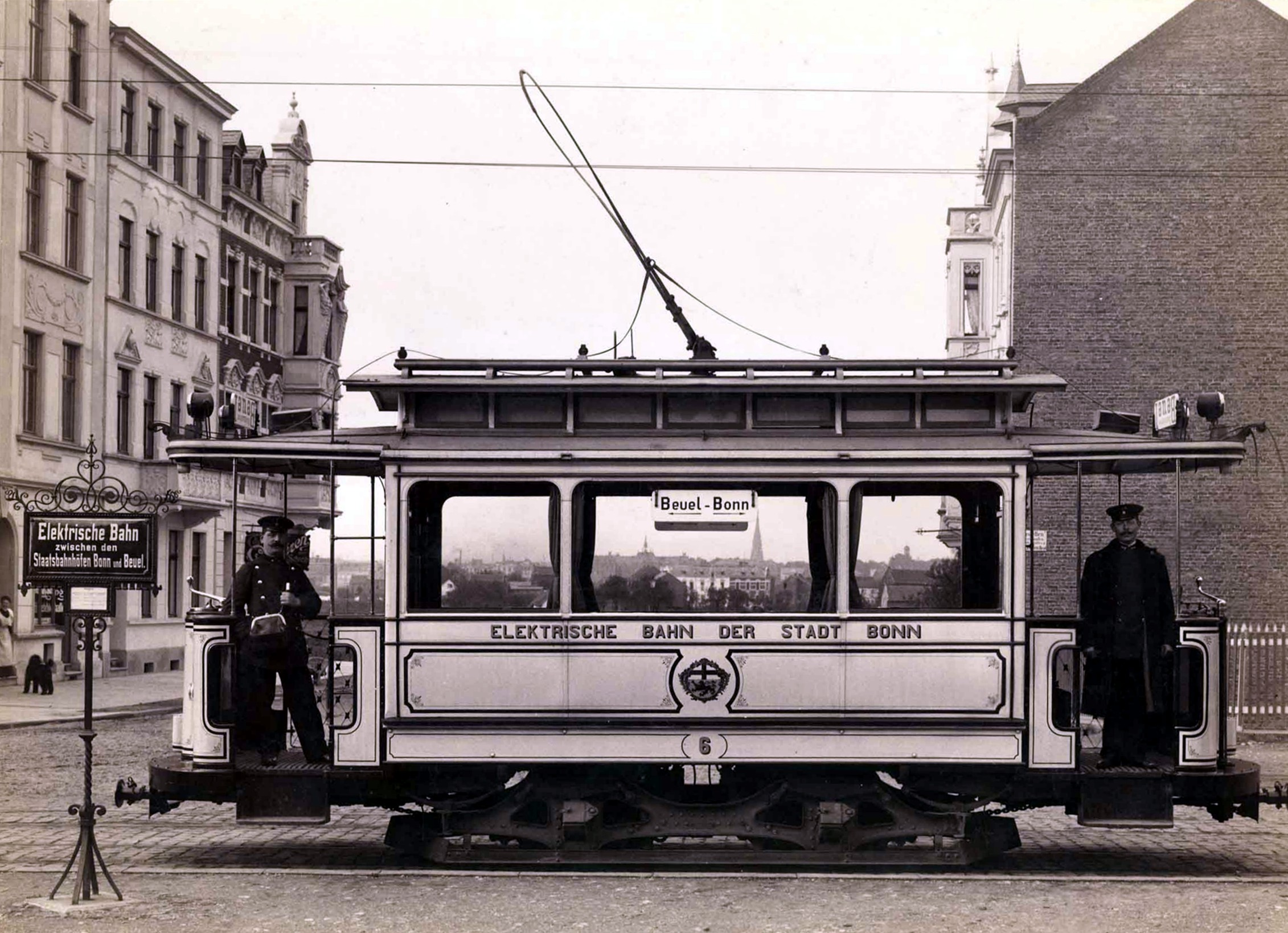 Deutschland, Bonn: Ein Wagen der elektrischen Bahn der Stadt Bonn auf der Strecke zwischen den Bahnhöfen Bonn und Beuel (Abschnitt der späteren Siebengebirgsbahn)